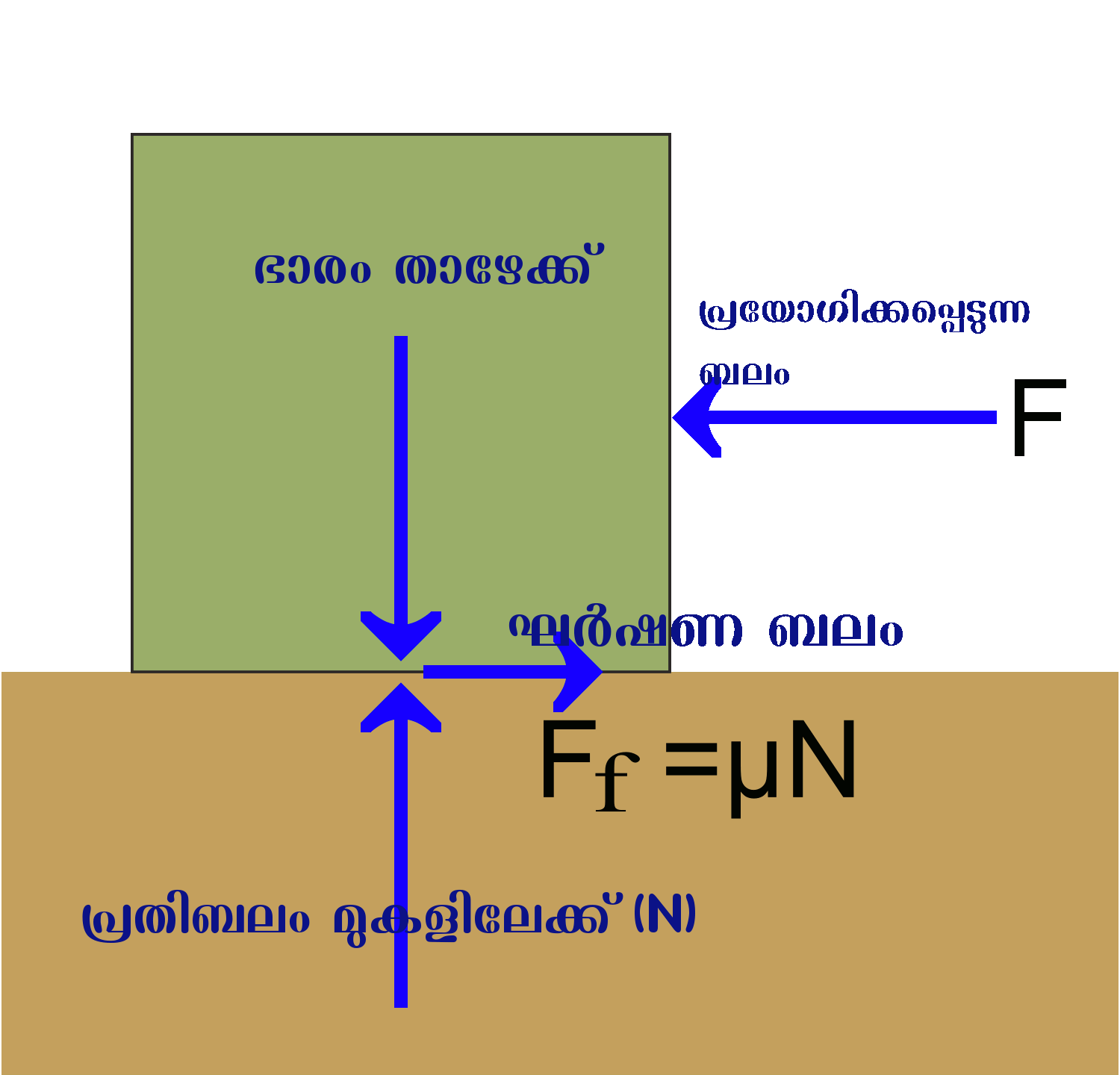 ഘർഷണം വിശദമാക്കുന്ന ചിത്രം